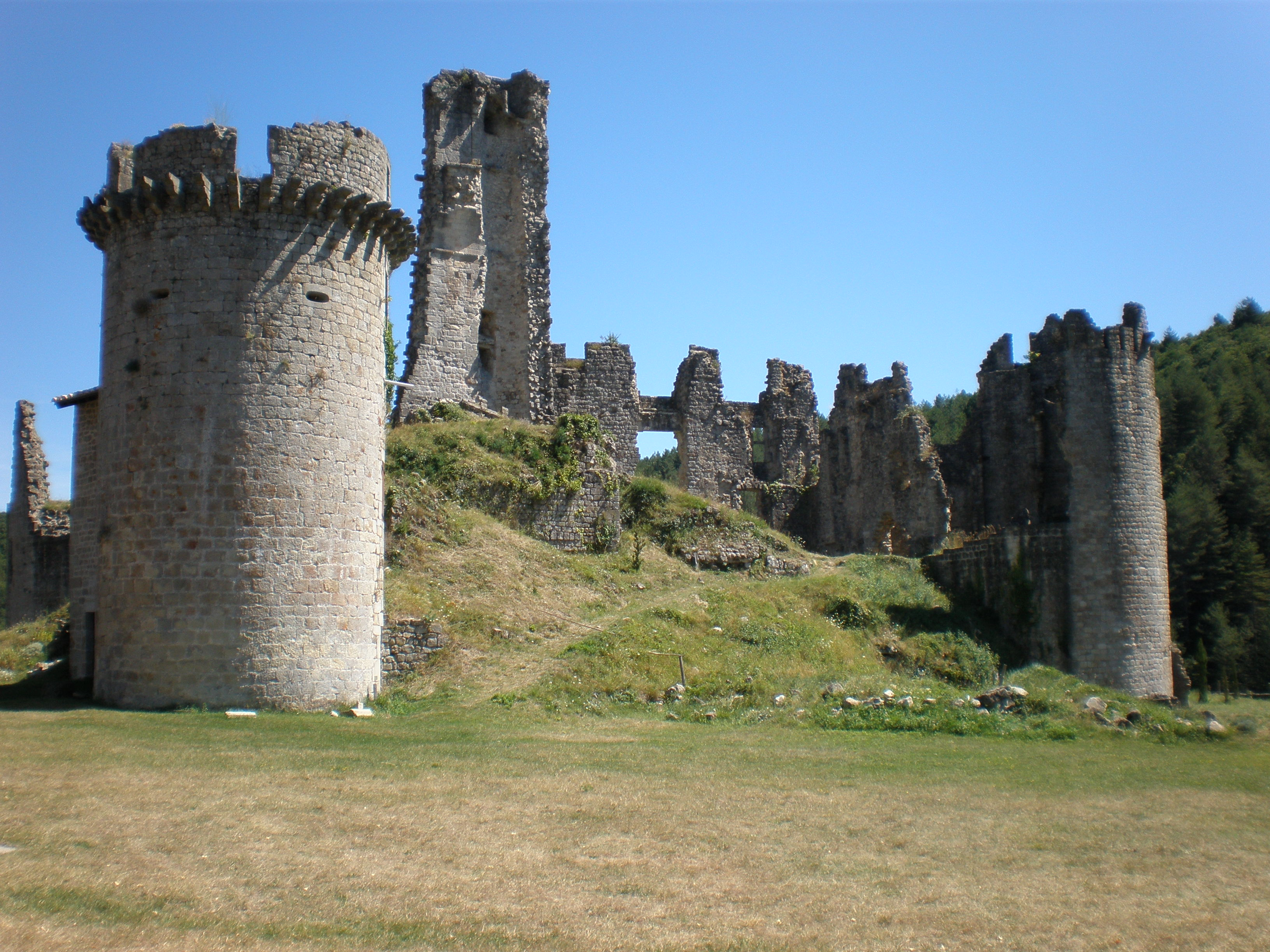 Ruines du château de Boulogne à St Michel de Boulogne (Ardèche)